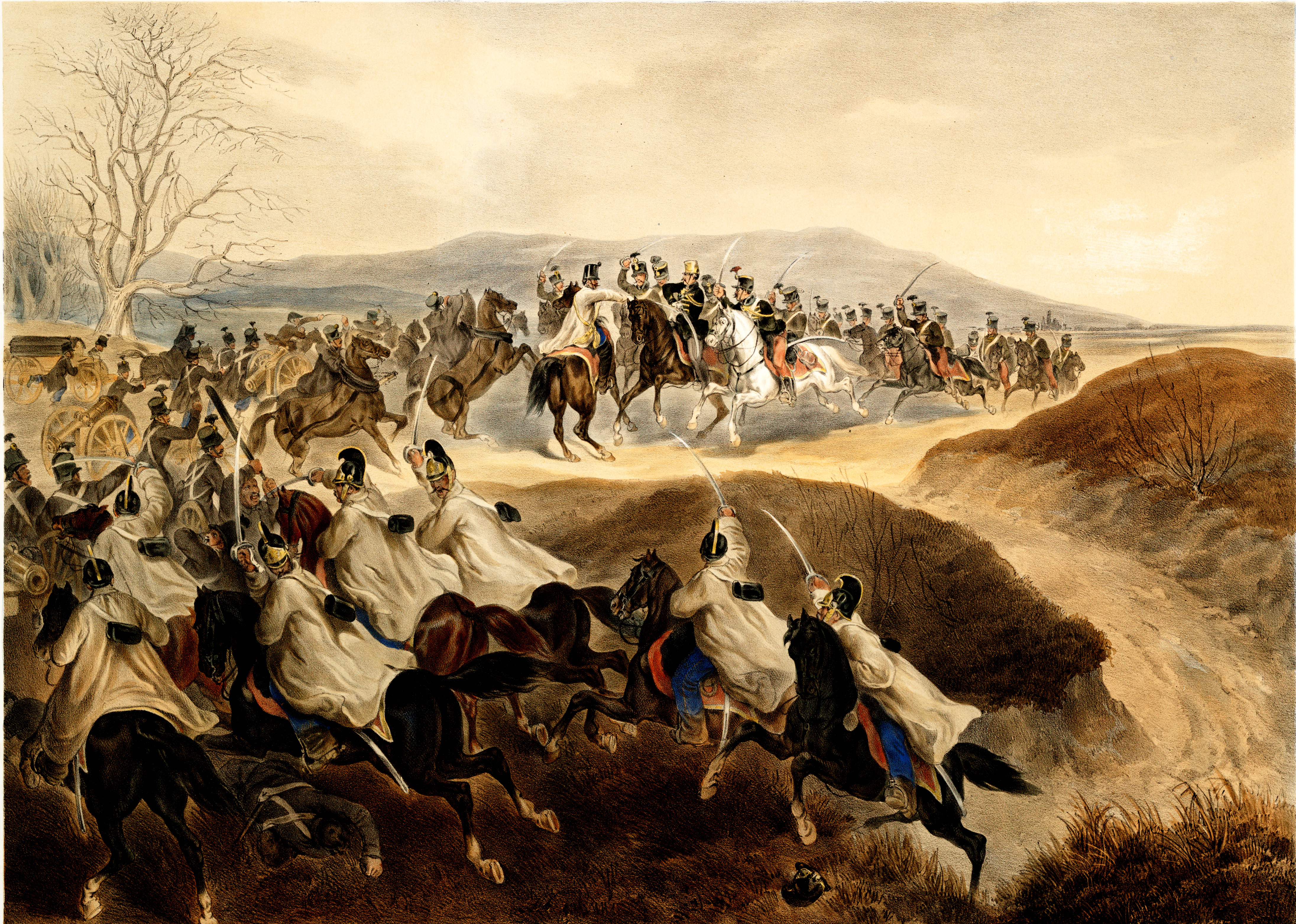 A Móri ütközet az 1848–49-es szabadságharc téli hadjáratának egyik ütközete volt melynek során 1848. december 30-án Perczel Mór honvéd tábornok hadteste Mór mellett vereséget szenvedett a Josip Jelačić vezette császári csapatoktól. A vereség a magyar főváros feladásához vezetett és a honvéd haderő – végső összeomlásától eltekintve – legsúlyosabb válságának kezdetét jelentette.